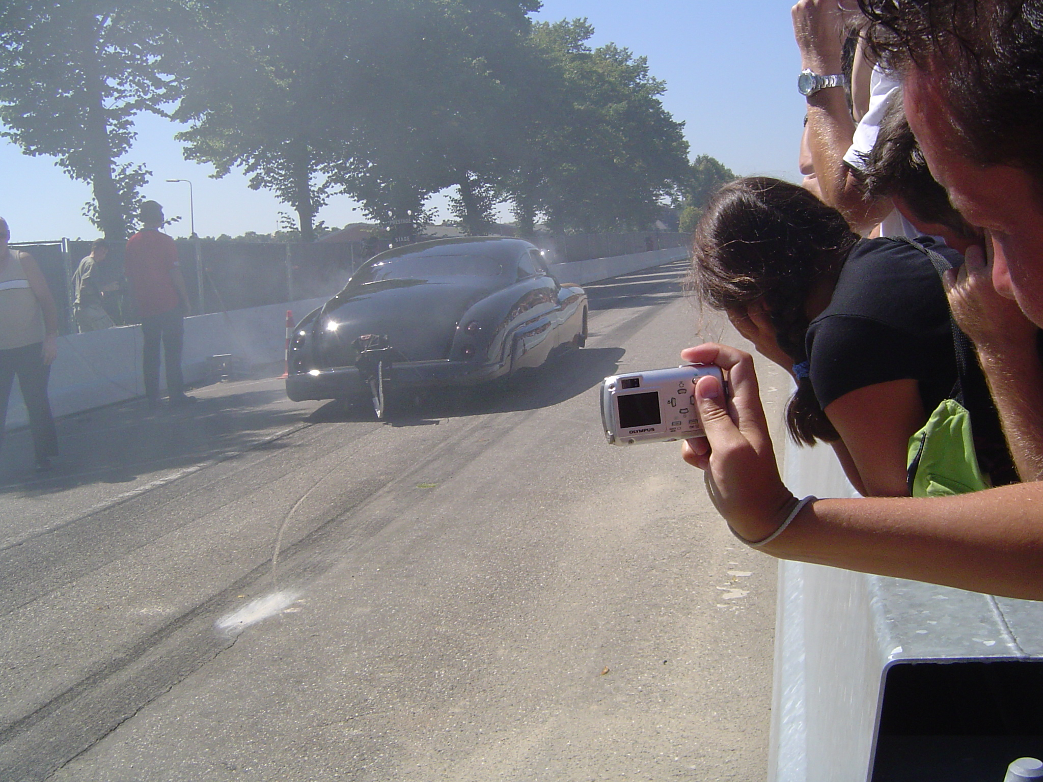 Rolling burn out: 1949-1950 Mercury dragrace car